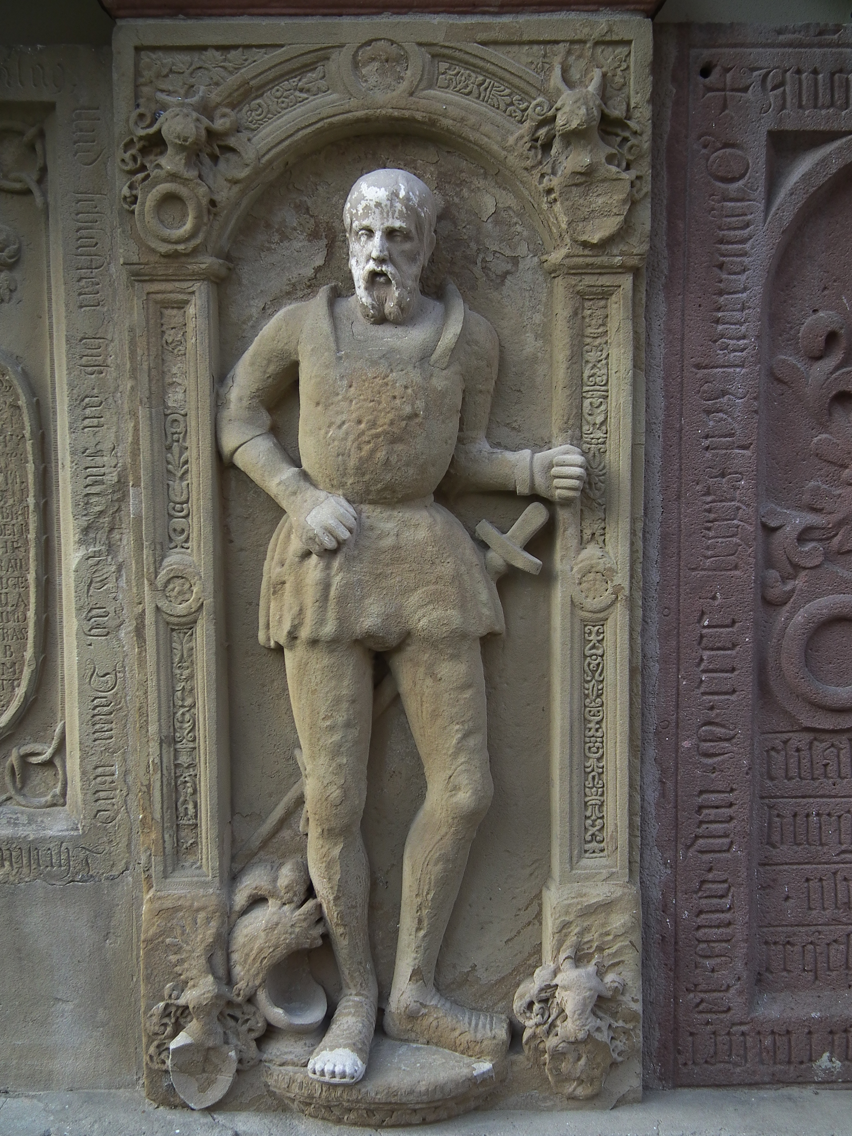 Grabplatte an der katholischen Kirche St. Laurentius in Nußloch (Baden-Württemberg, Deutschland): Hans von Bettendorff, gest. 1556